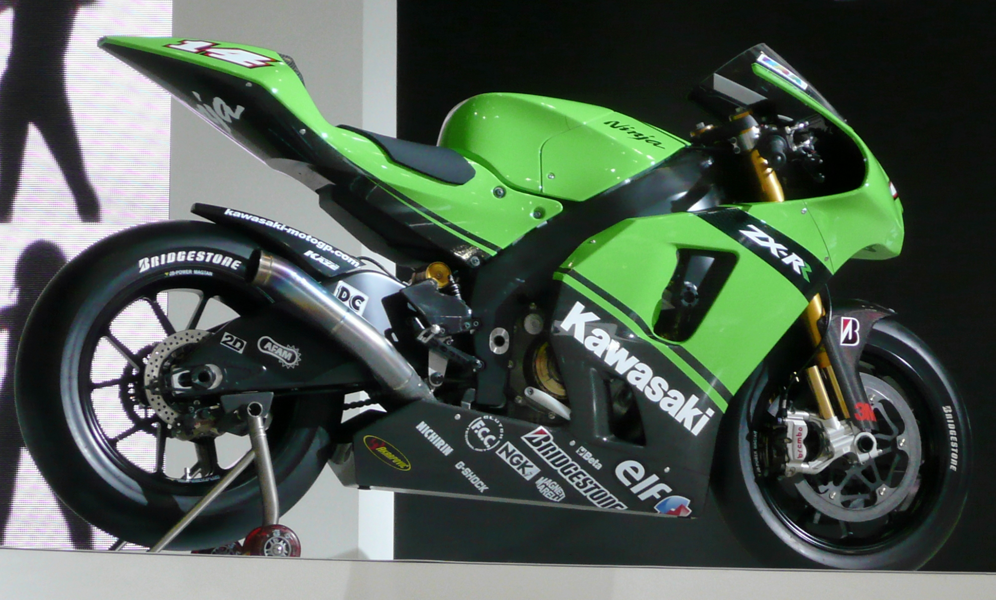 Kawasaki ZX-RR (2007 Tokyo Motor Show)